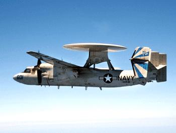 Foto einer Grumman E-2C "Hawkeye"